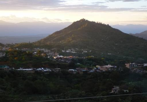 mi pueblo hermoso